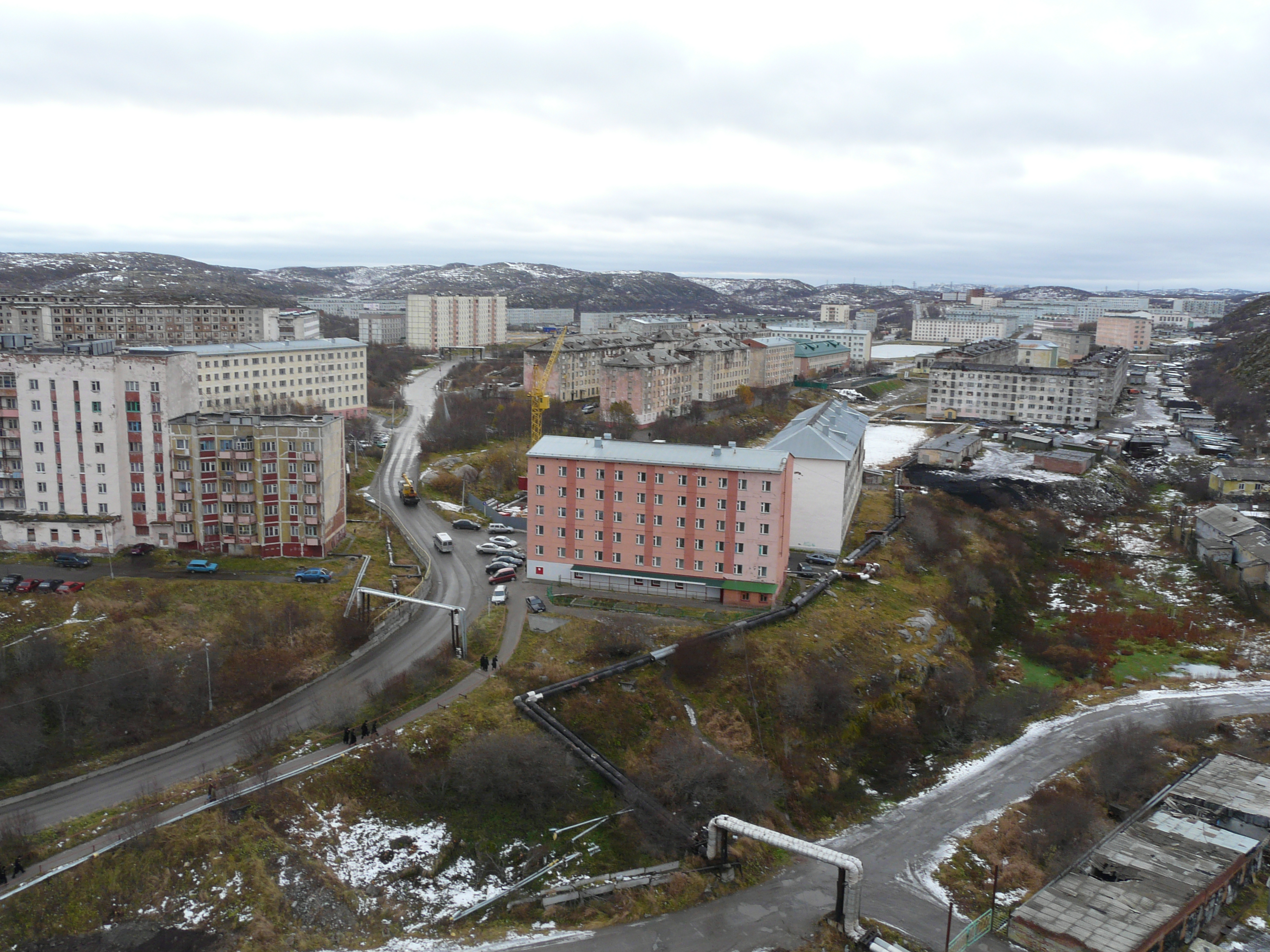 Вид с дымовой трубы ТЭЦ